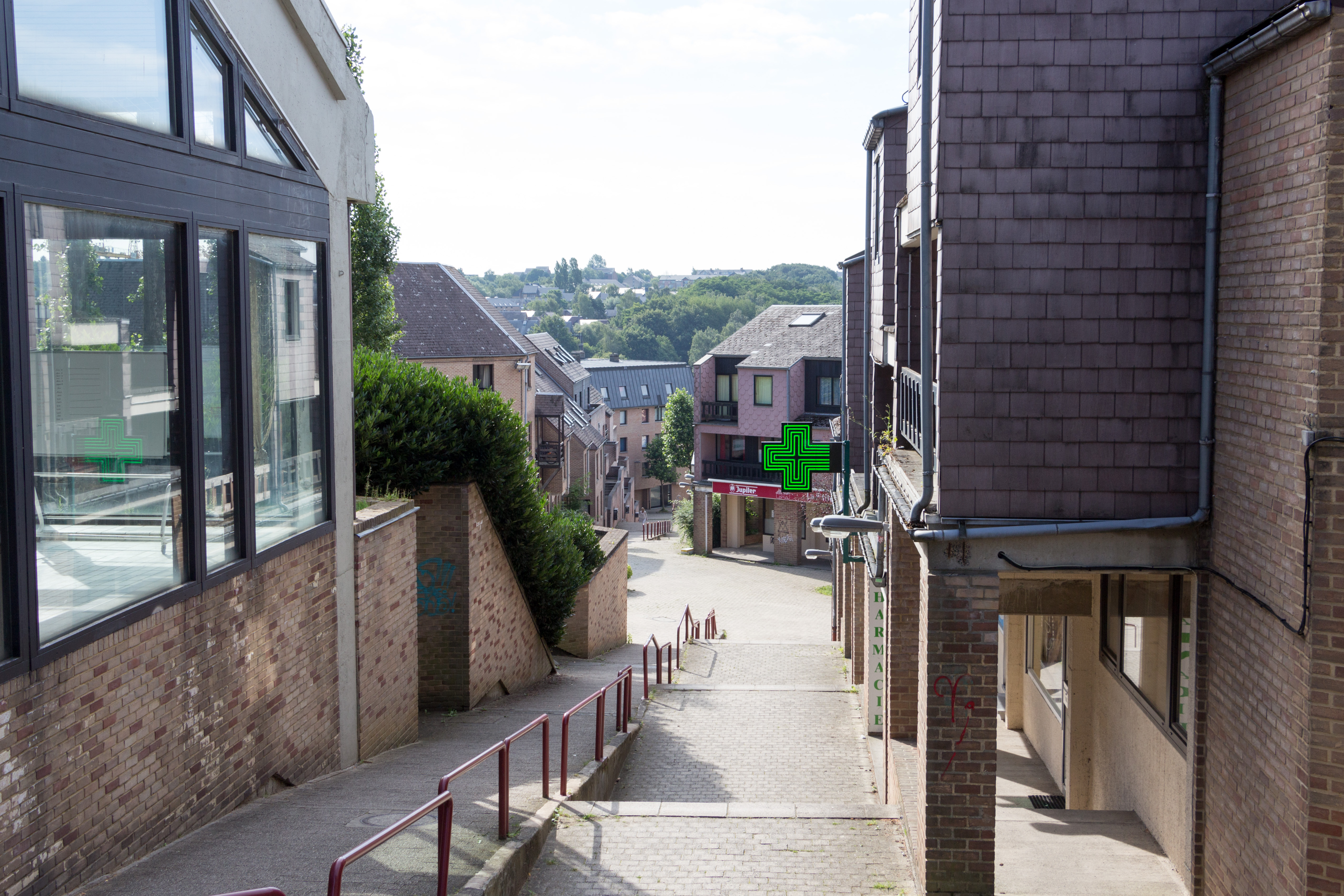 La Rampe du Val telle que vue depuis la ferme du Blocry. En contrebas de celle-ci il est possible d'accéder au Lac.